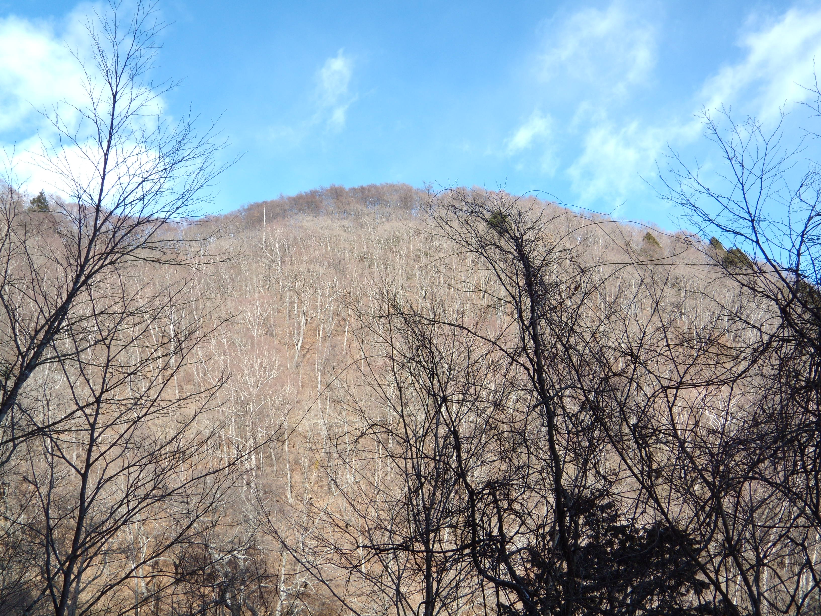 東側から見た大平山